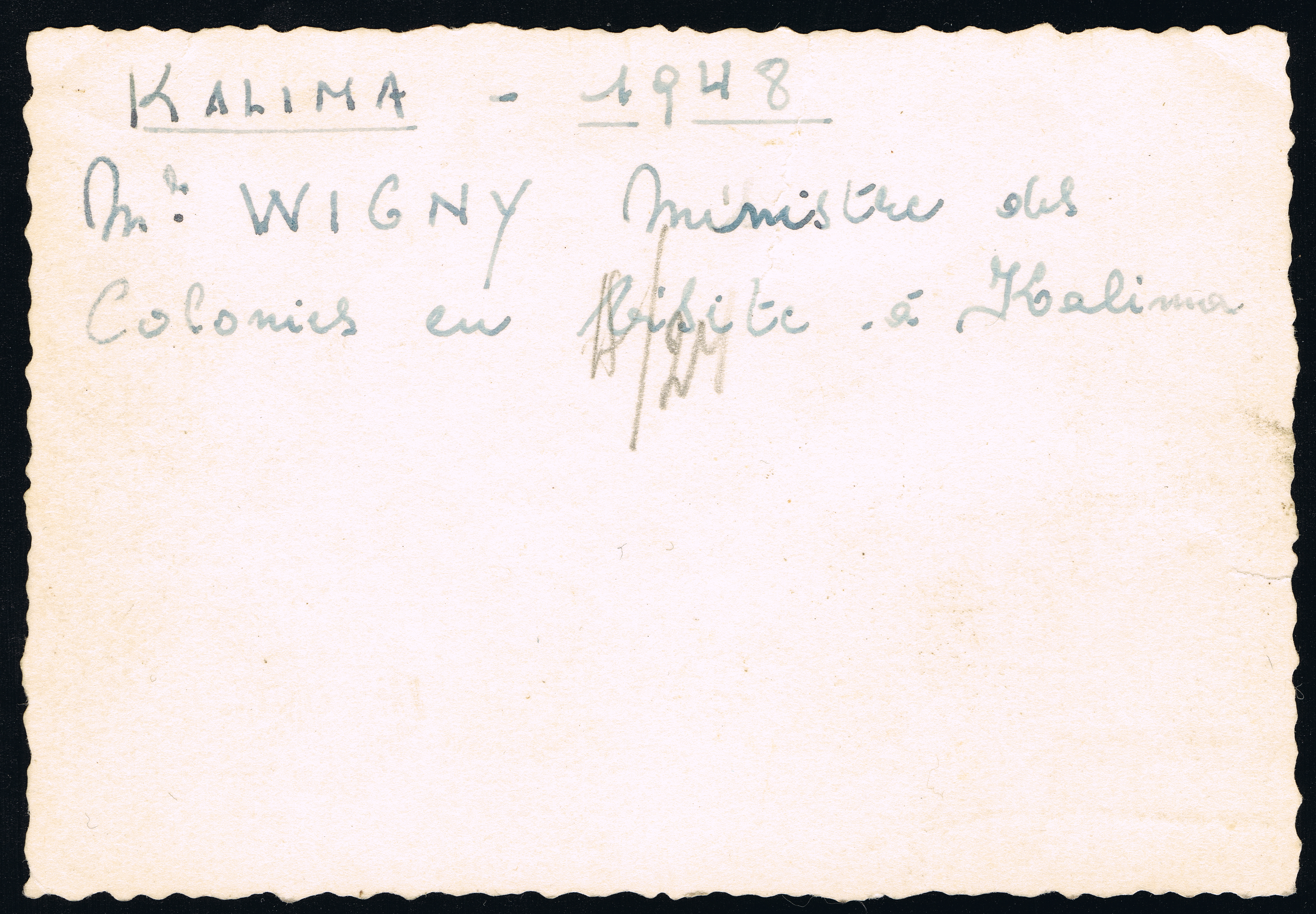 Visite du ministre Wigny à Kalima, ex-Congo Belge. Actuel RDC. Date exacte inconnue.